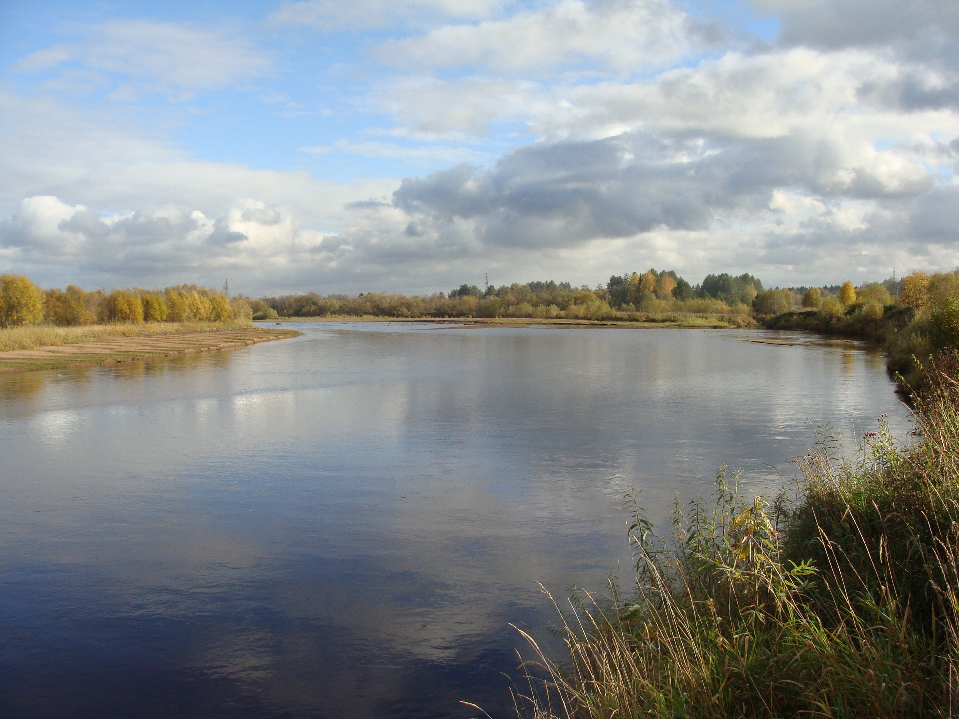 Река Виледь у деревни Нырма